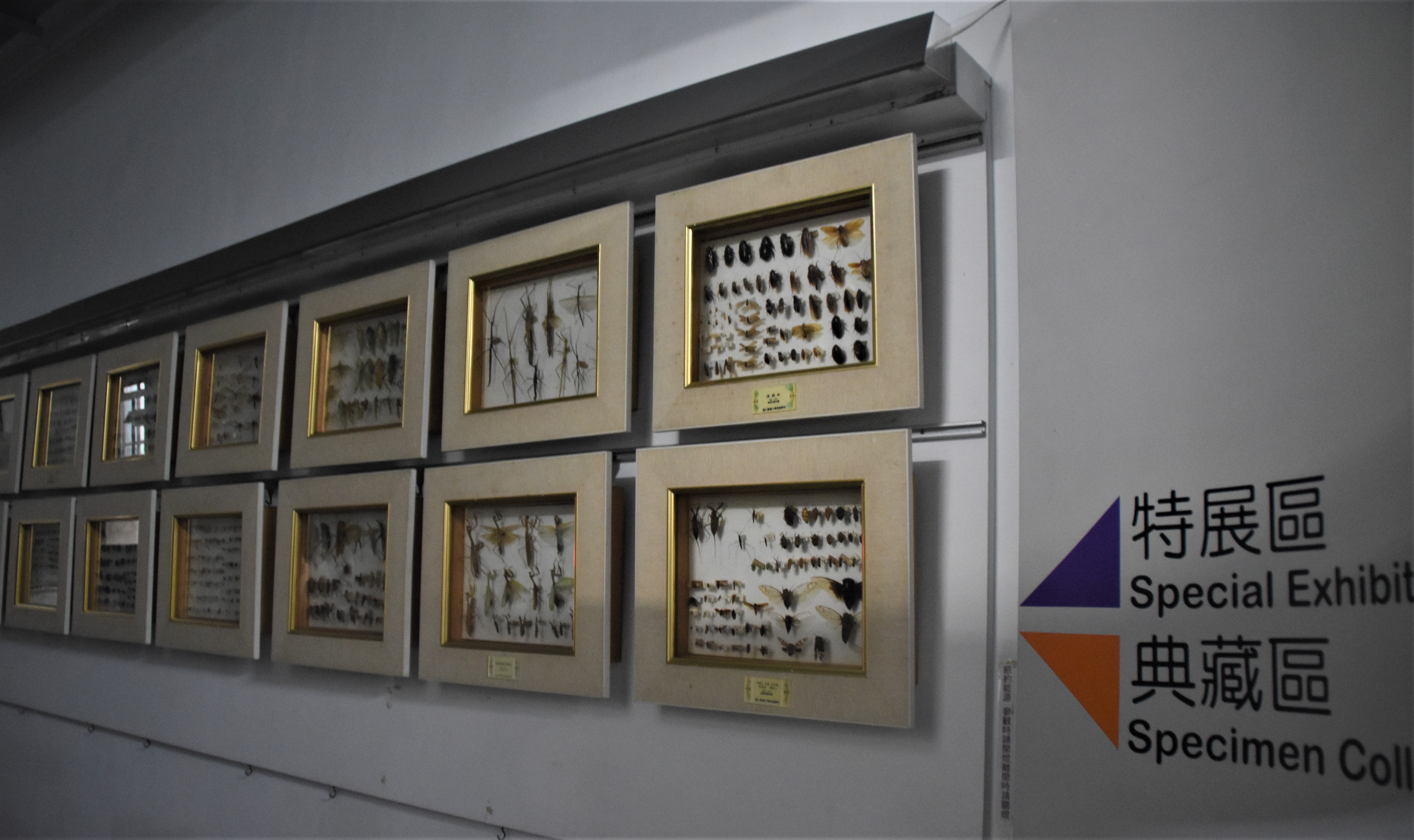 臺大昆蟲館創立於1936年，位於蟾蜍山下，地址為羅斯福路4段113巷27號。昆蟲館為磚造2層樓房，建坪約1,000平方公尺，擁有獨特的歷史。